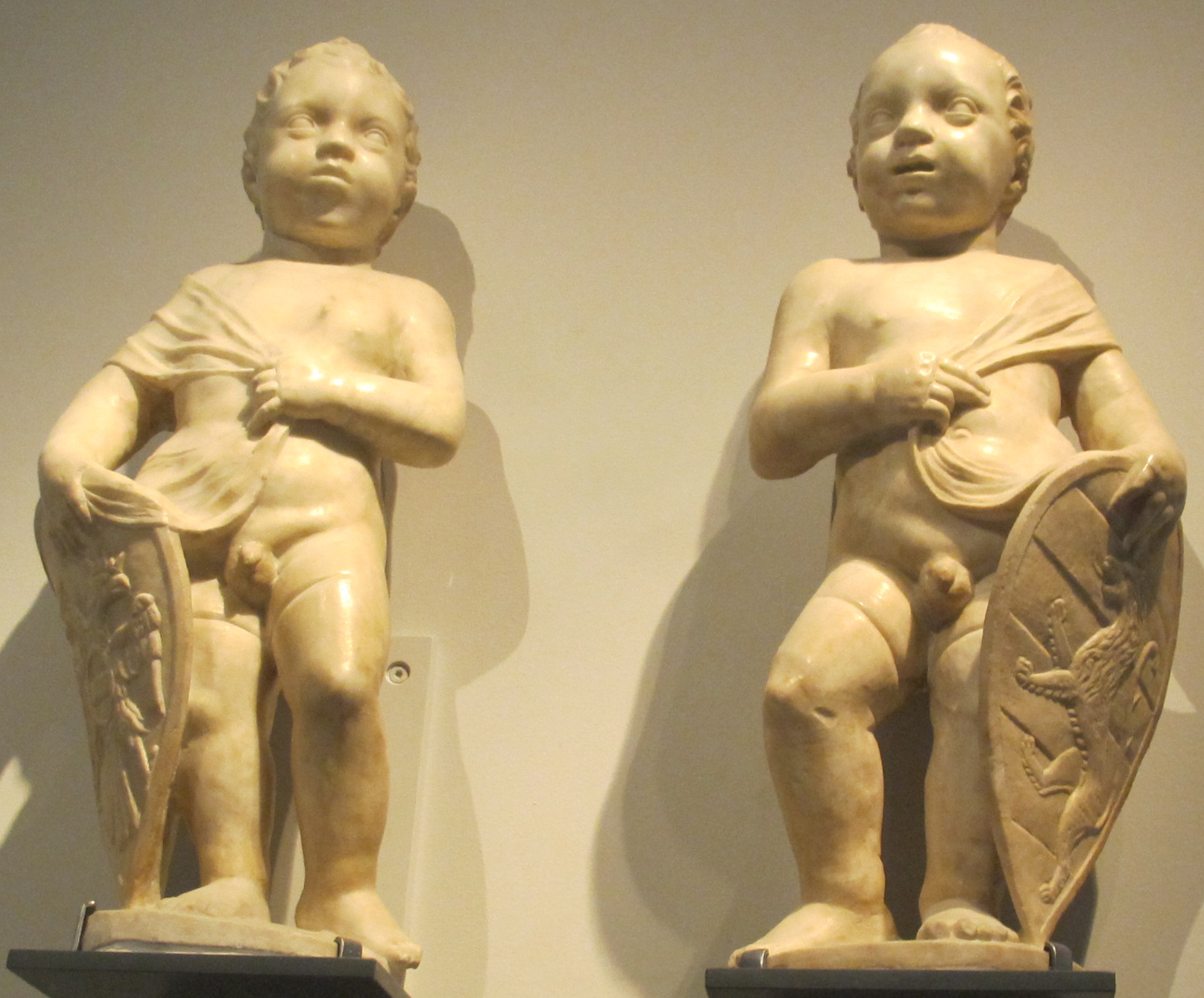 Stile di pietro lombardo, due putti con scudi, 1500 ca.